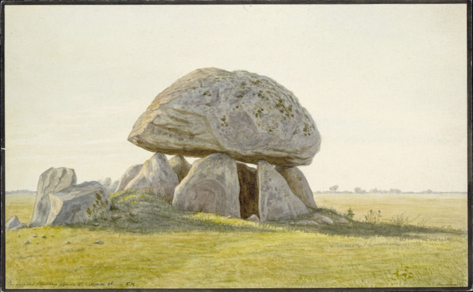 Akvarel af hylledysse, malet af J. Kornerup 1877. Fra Skalstrup, Roskilde Vor Frue sogn.